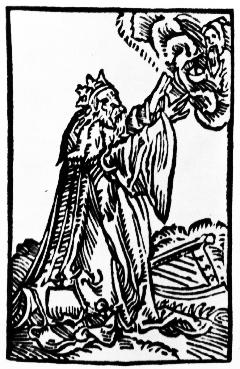 "Цар Давід" (у арыгінале без назвы). Псалтыр. Прага, 1517. Тытульны аркуш і ар. 5. 61Х44 мм.